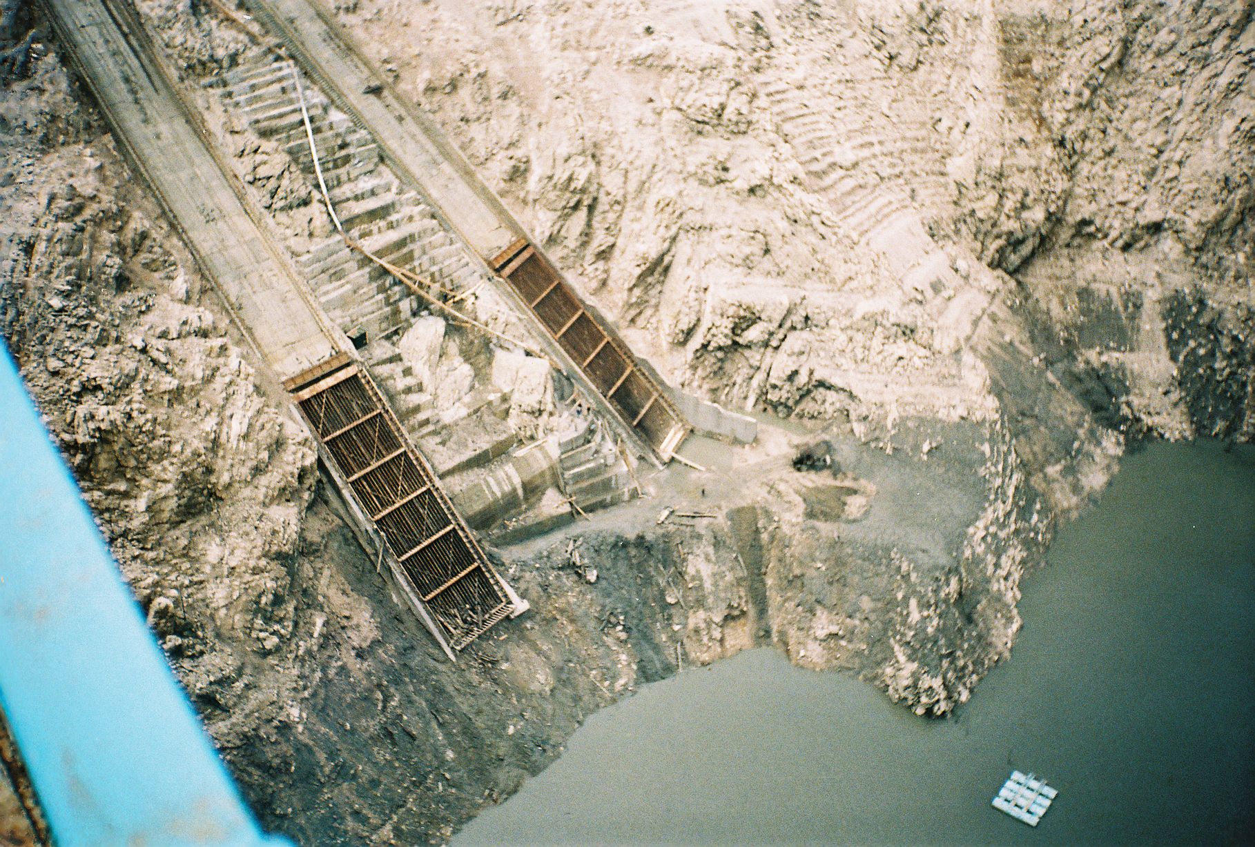 ენგურჰესის სადერივაციო გვირაბი